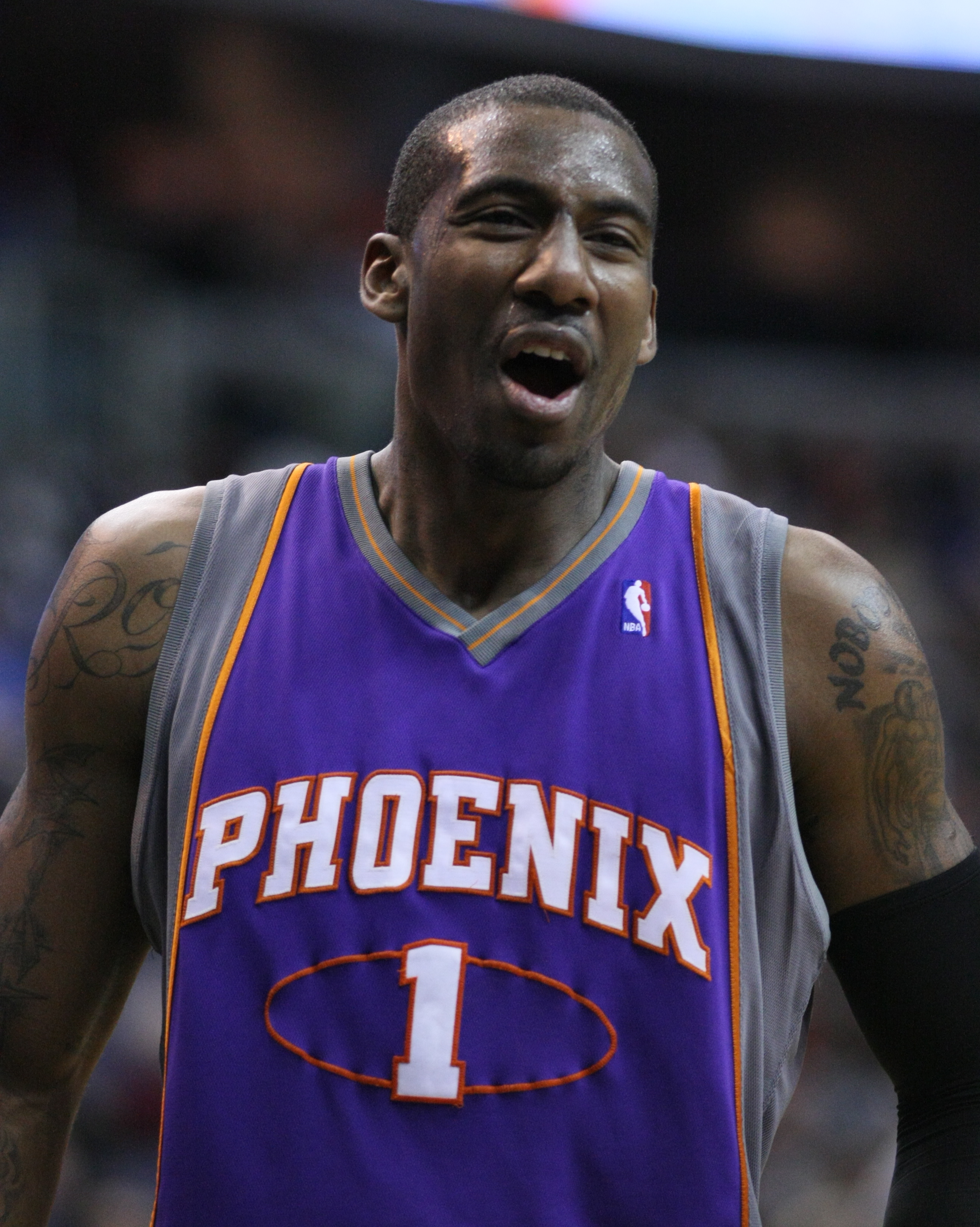 El jugador norteamericano de baloncesto Amare Stoudemire.